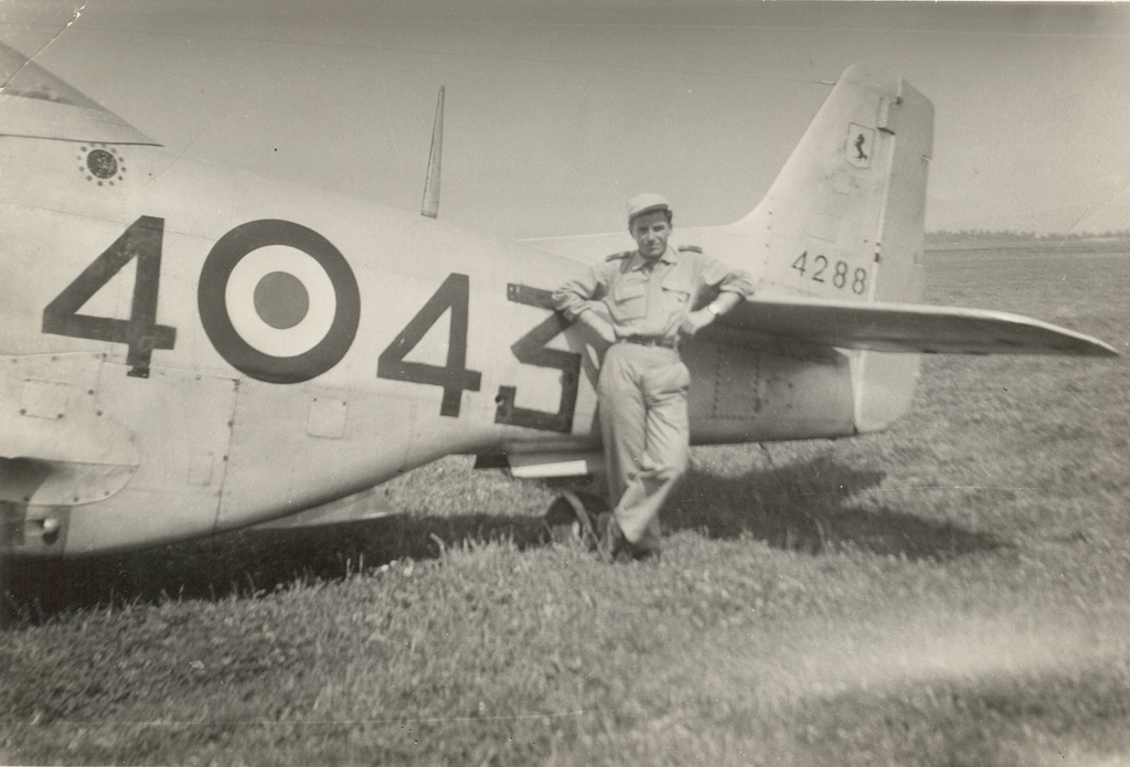 Immagine scattata negli anni '50 presso l'aeroporto militare di Napoli Capodichino.